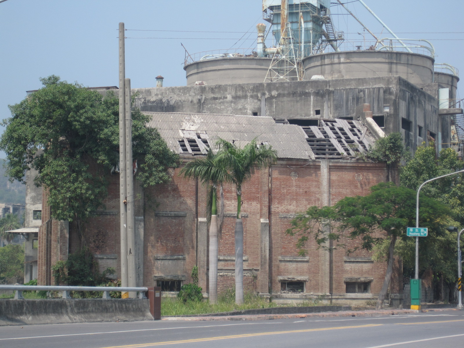 中文（台灣）: 台泥高雄廠舊紅磚倉庫